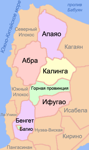 Карта провинций Кордильерского административного региона